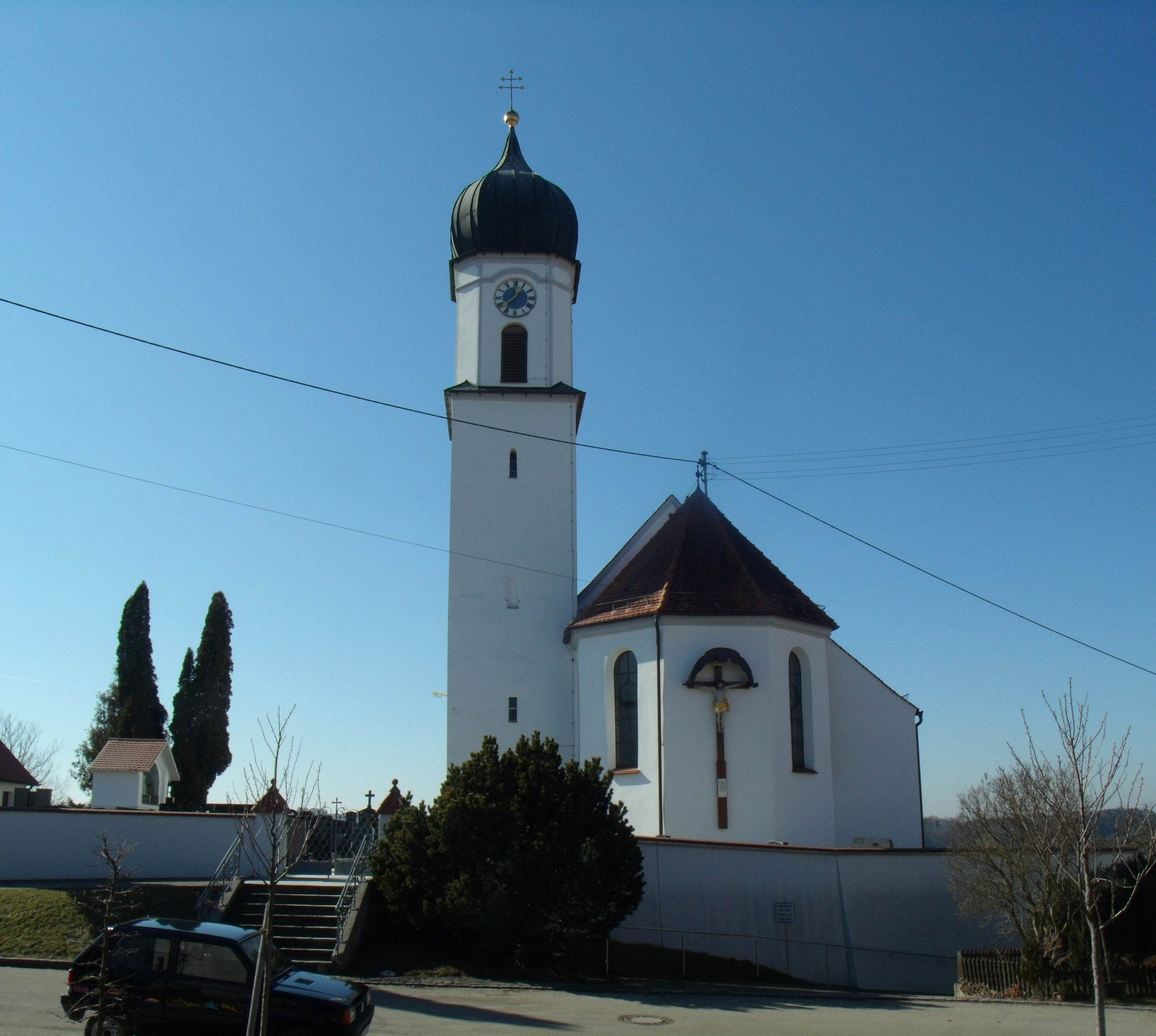 Pfarrkirche